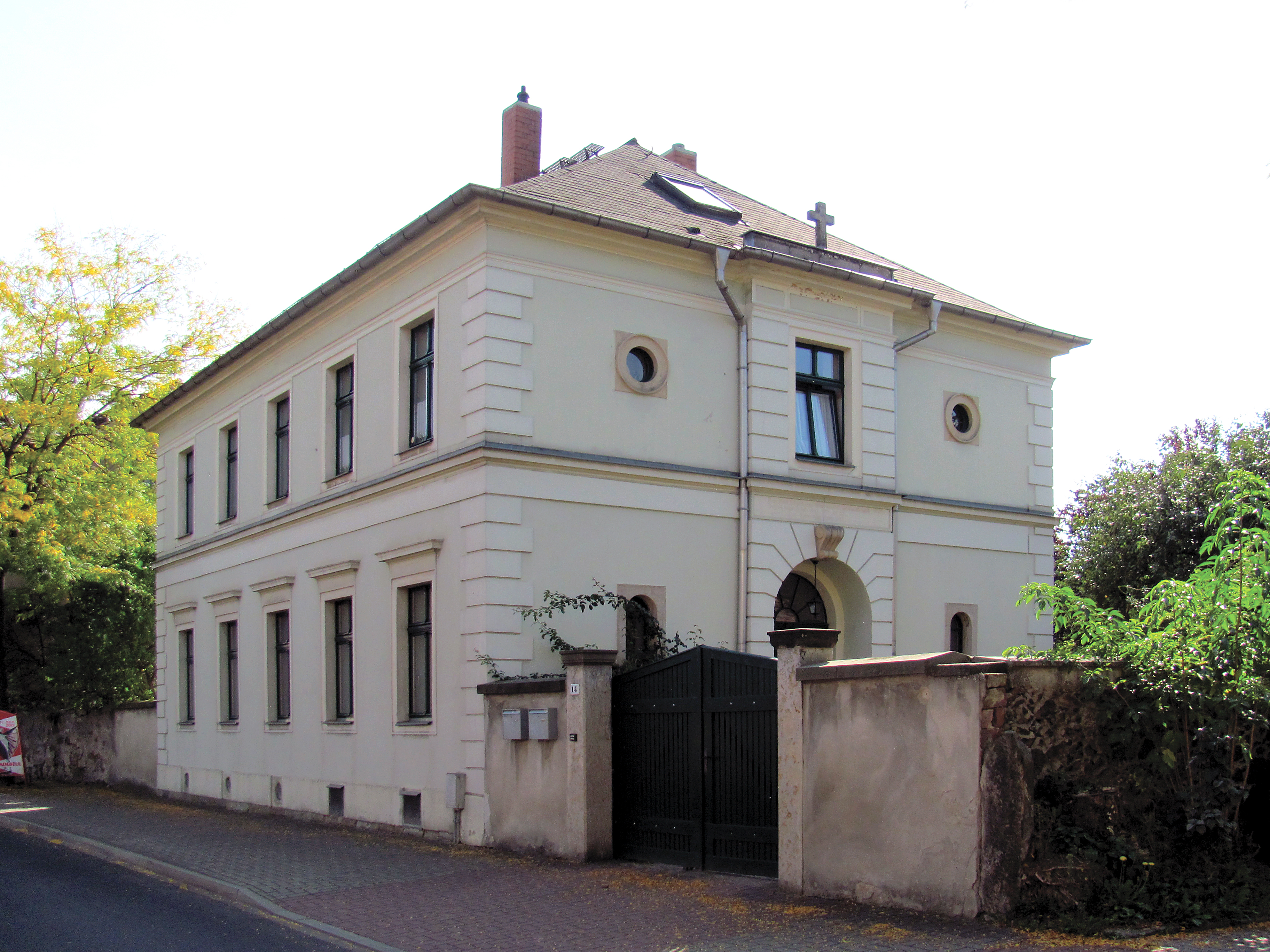 Radebeul, ehem. Dorfschule Kötzschenbroda